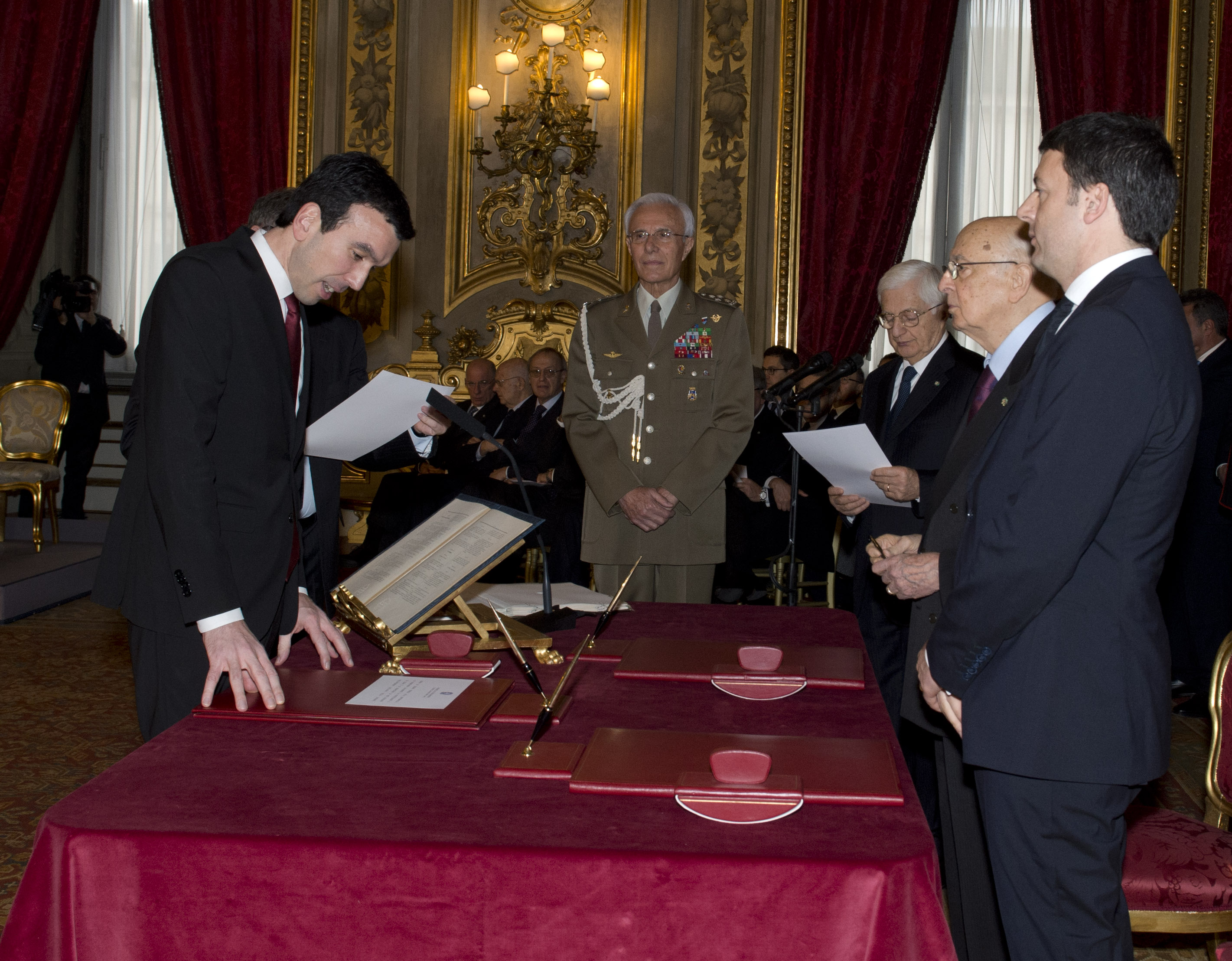 Government